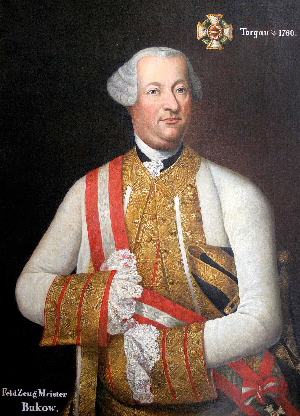 Feldzeugmeister Adolf Nikolaus Frhr. v. Buccow (1712-1764)